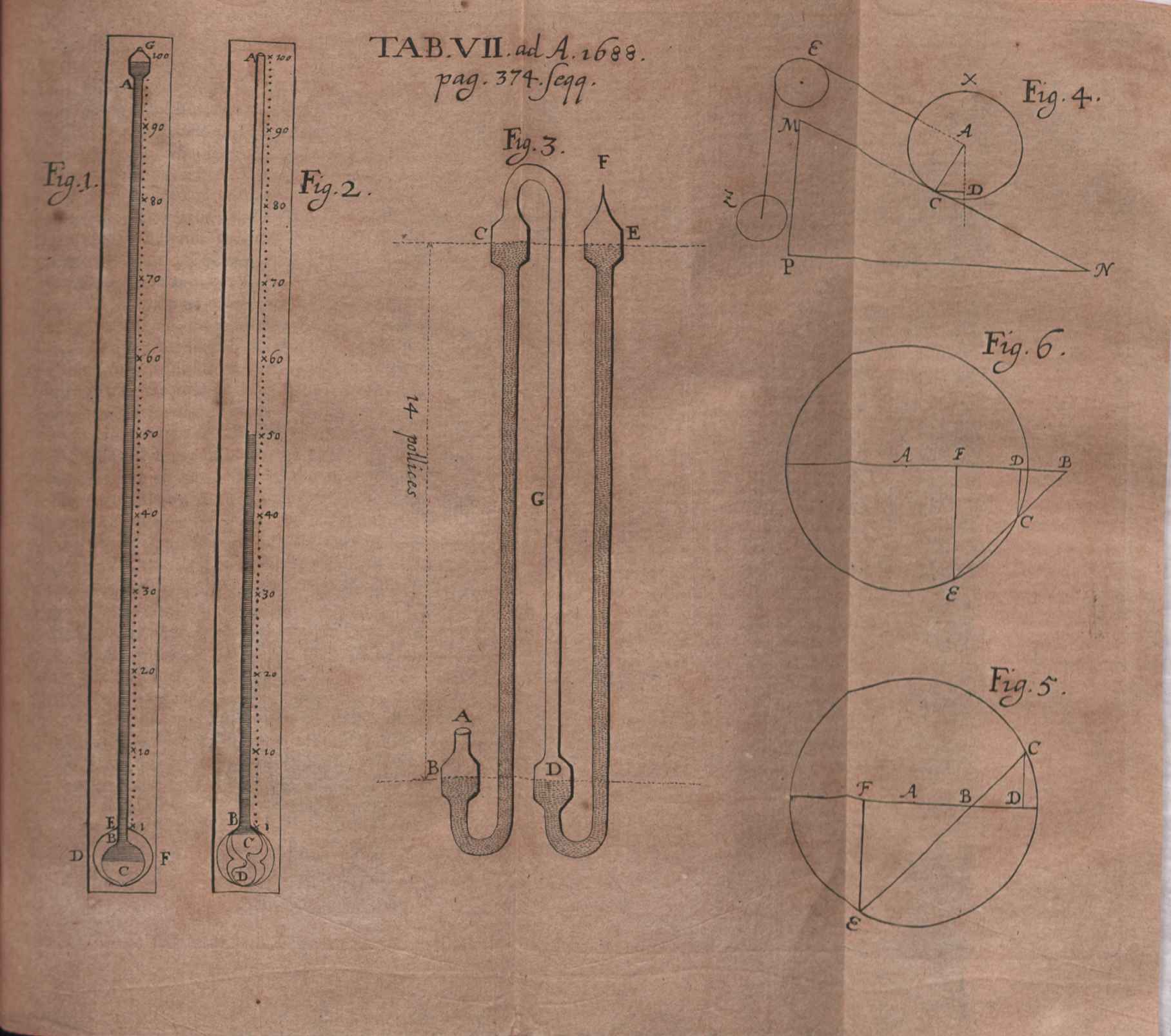 Illustration